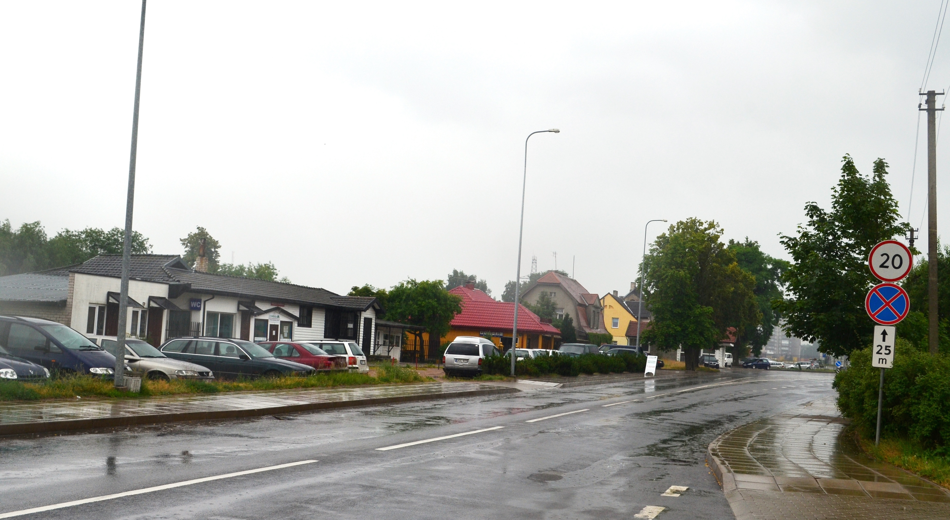 Panemunė, Pagėgių sav.